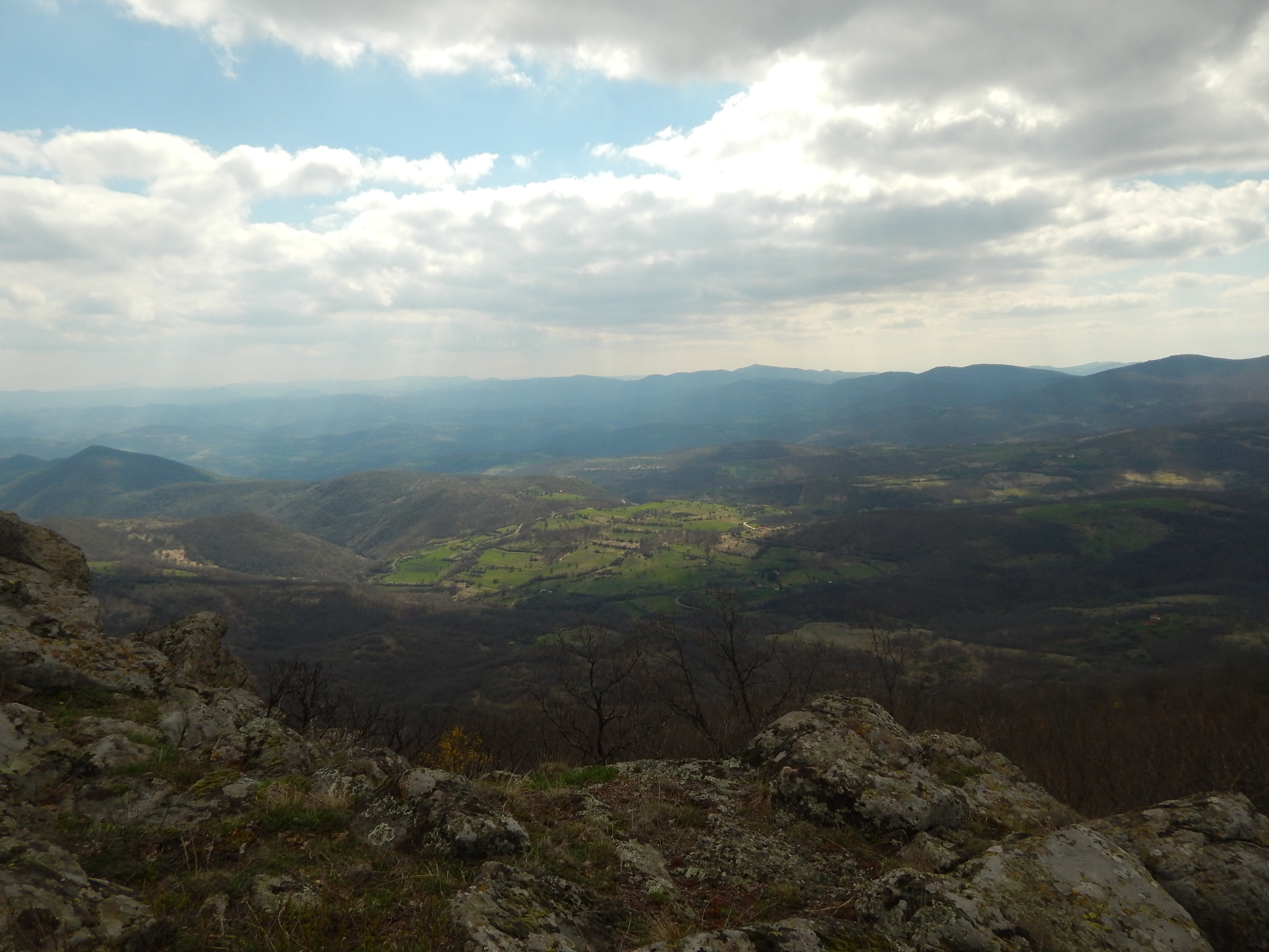 Предео изузетних одлика Радан